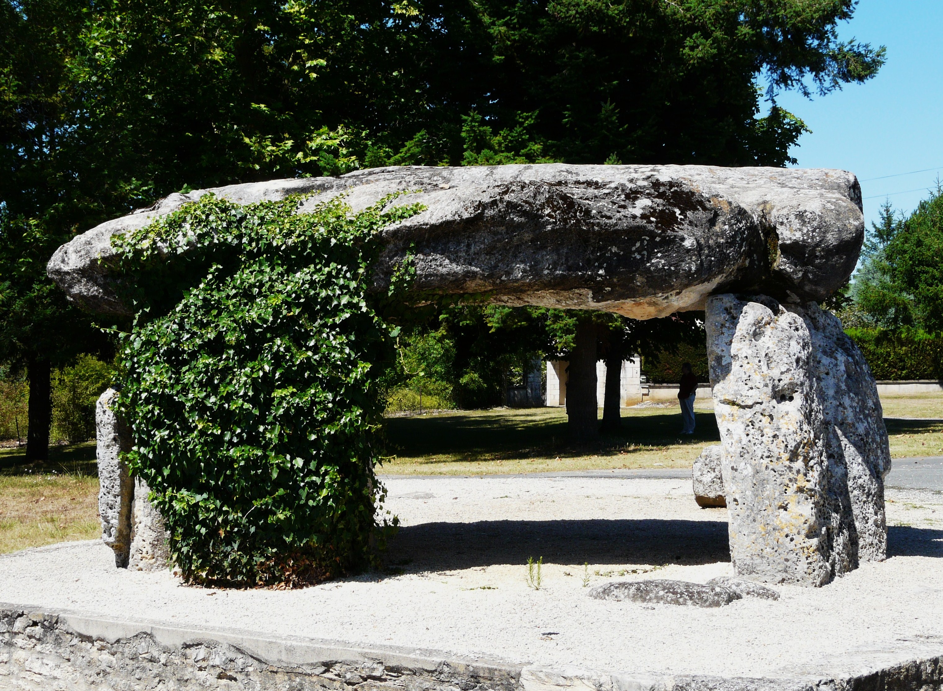 Dolmen de Peyrelevade, Brantôme, Dordogne, France